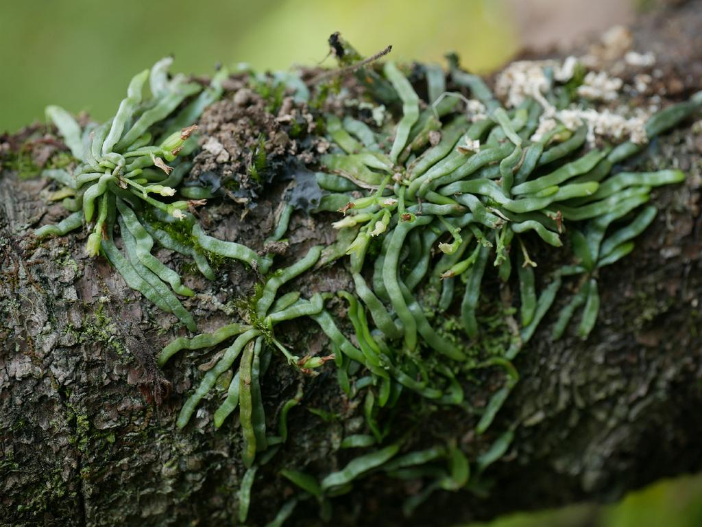 Taeniophyllum glandulosum：クモラン 2018/07/19 和歌山県田辺市：Tanabe City. Wakayama Pref. Japan